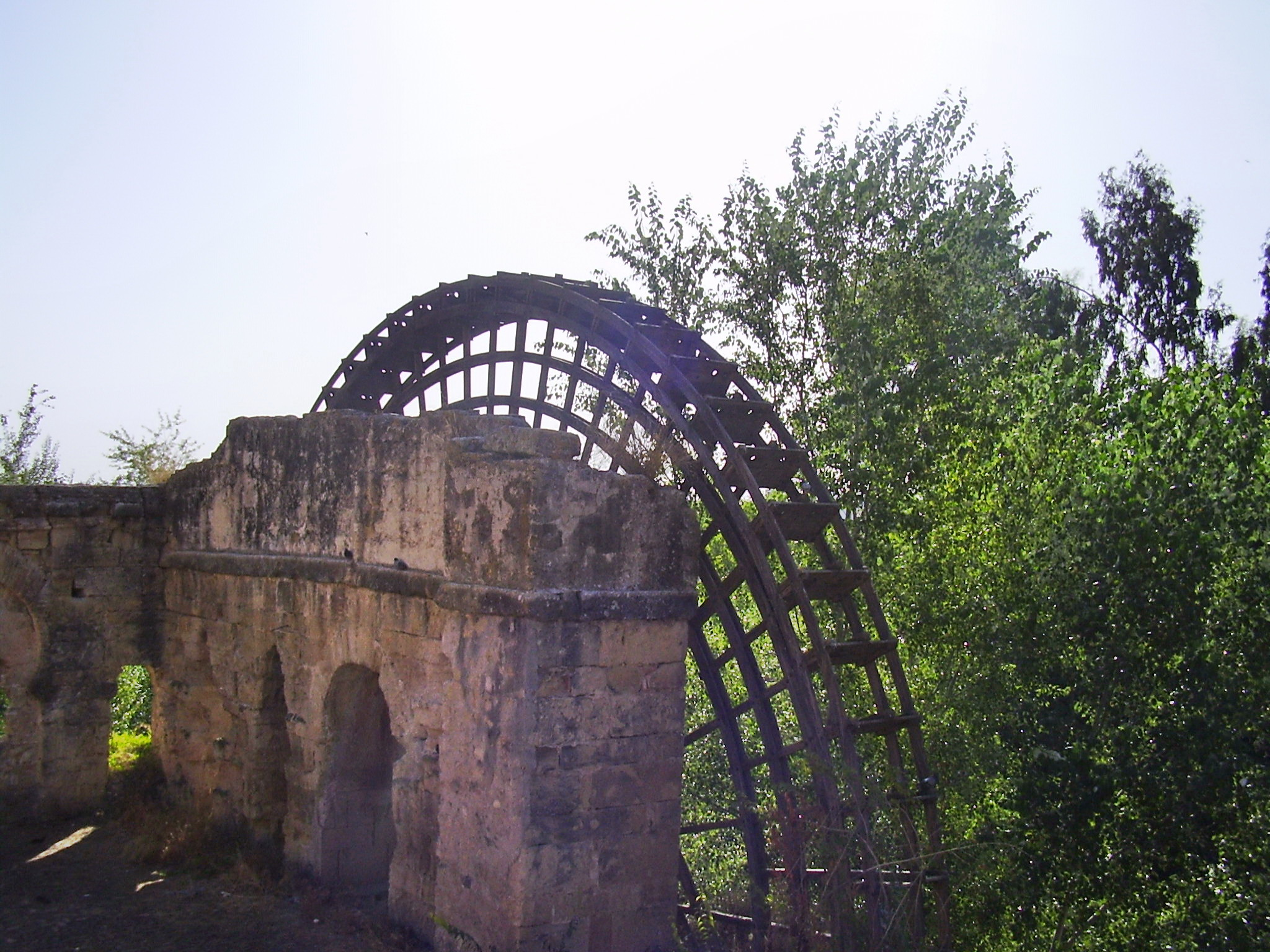 Molino romano en Cordoba